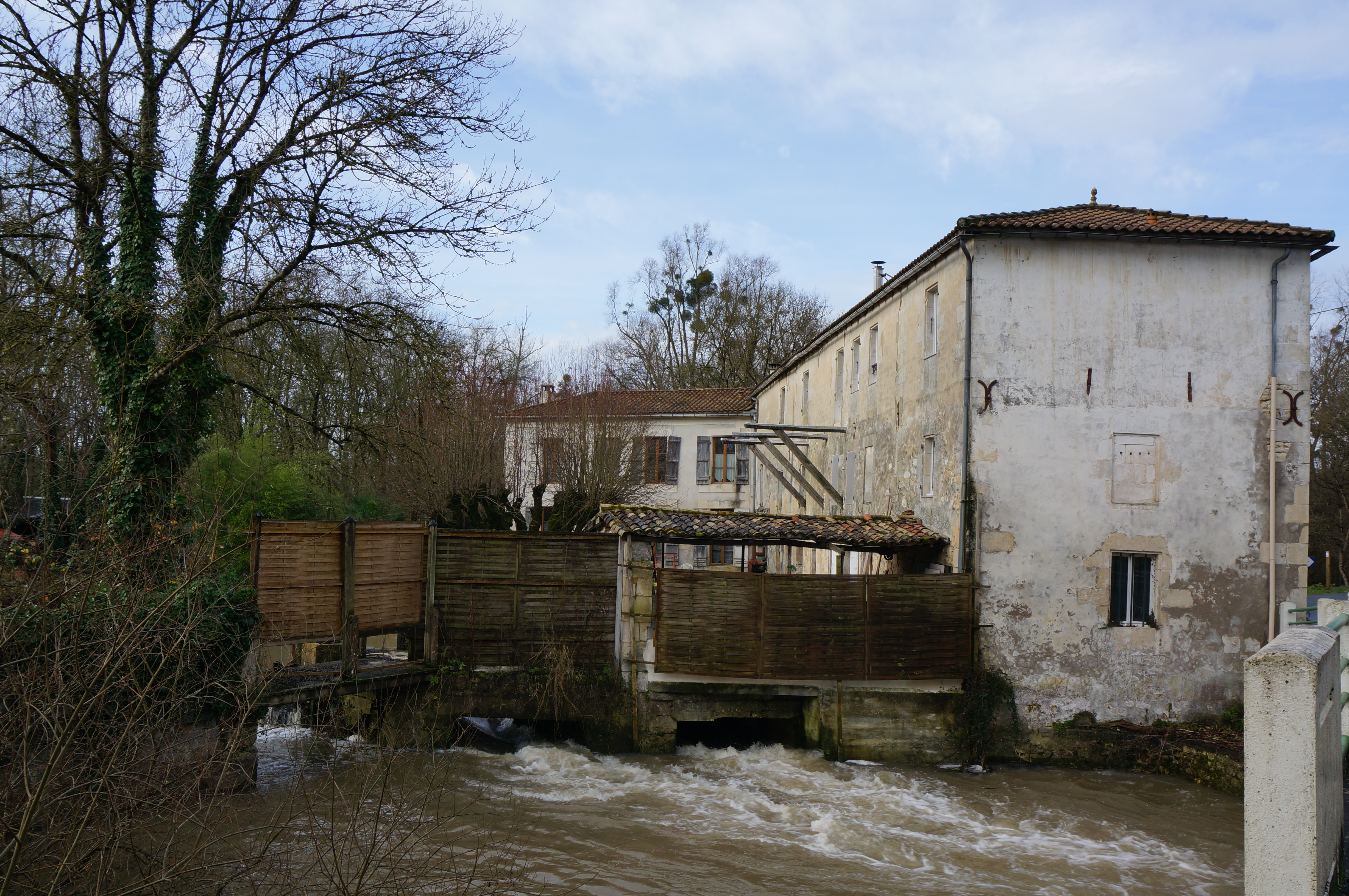 à Pons.